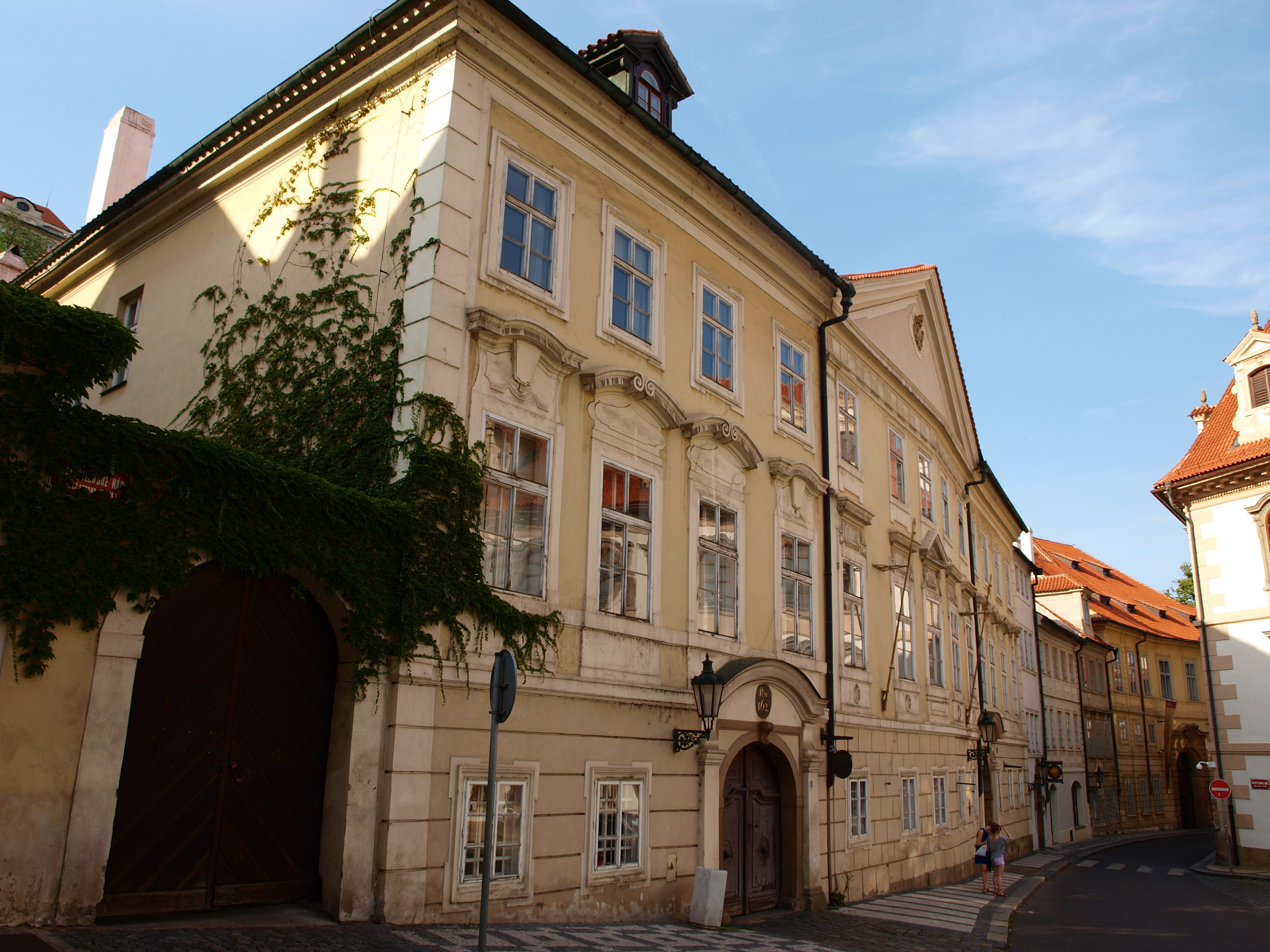 Ledebourský palác v Praze